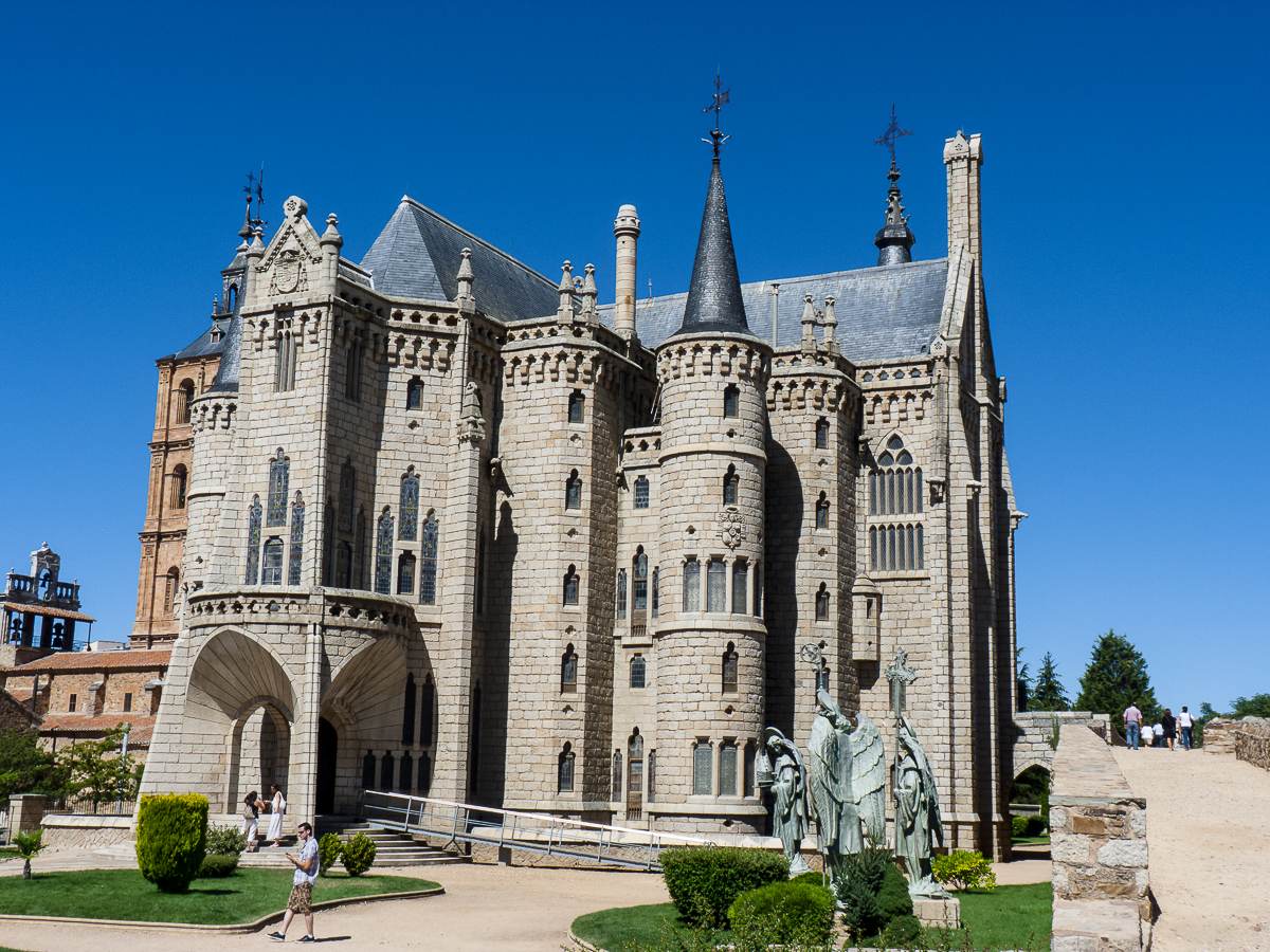 08082013 123255 ASTORGA 0141